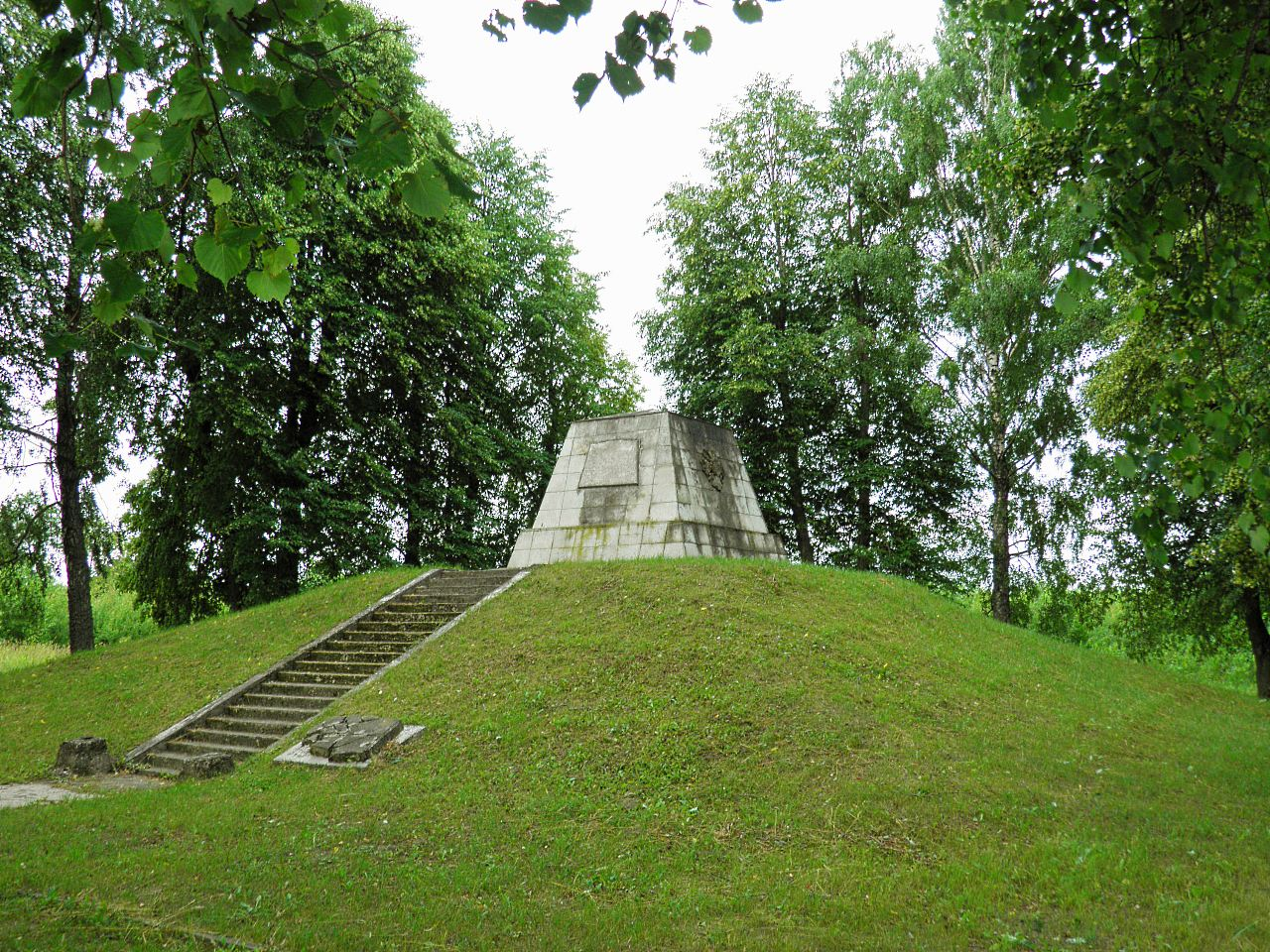 Salgale parish, LV-3045, Latvia